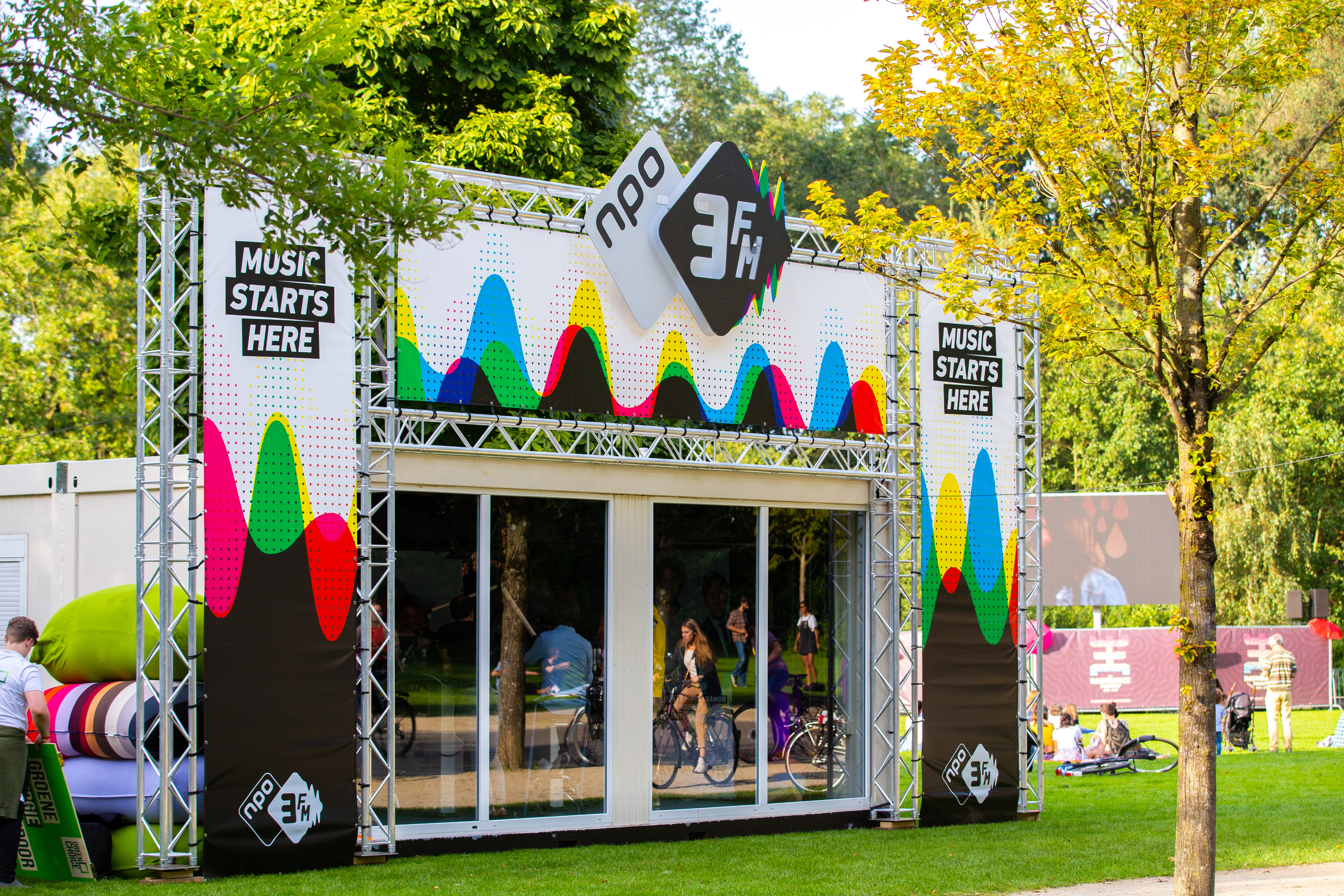 Studio van 3FM in het Vondelpark, Amsterdam